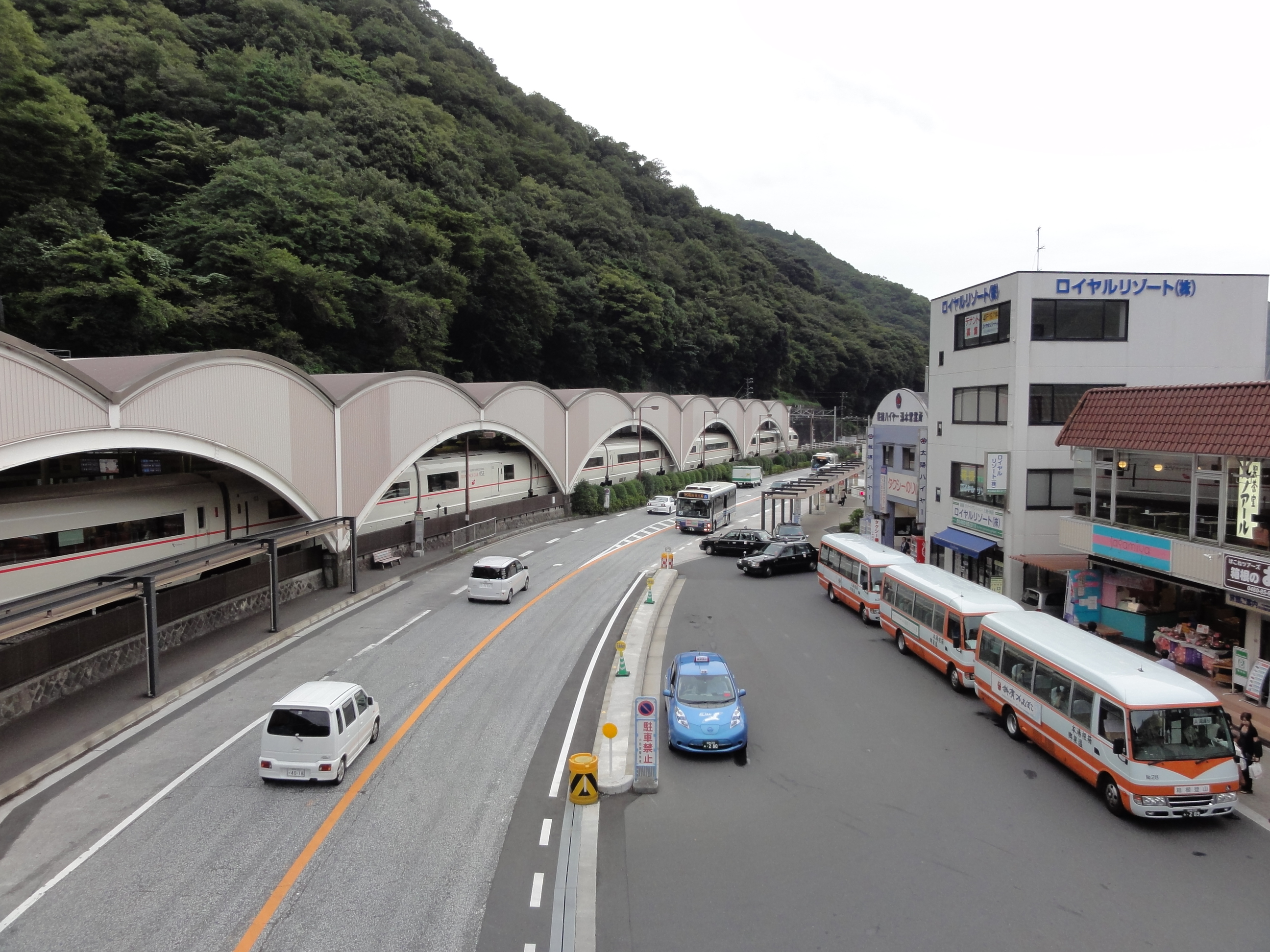 箱根湯本駅前